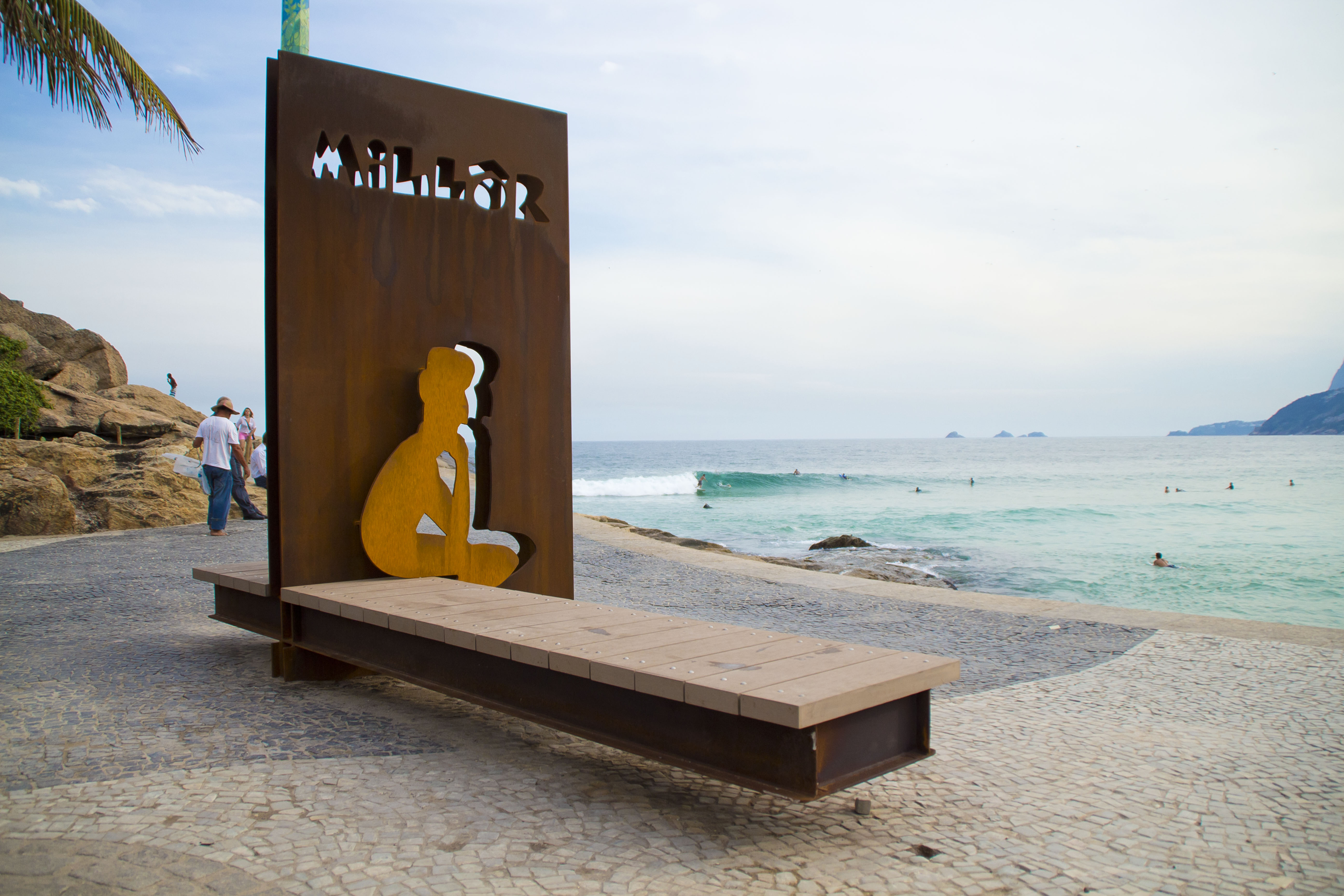 Monumento e banco panorâmico em homenagem a Millôr Fernandes localizados no Largo do Millôr, recanto entre a Praia do Diabo e a Praia do Arpoador, Rio de Janeiro.